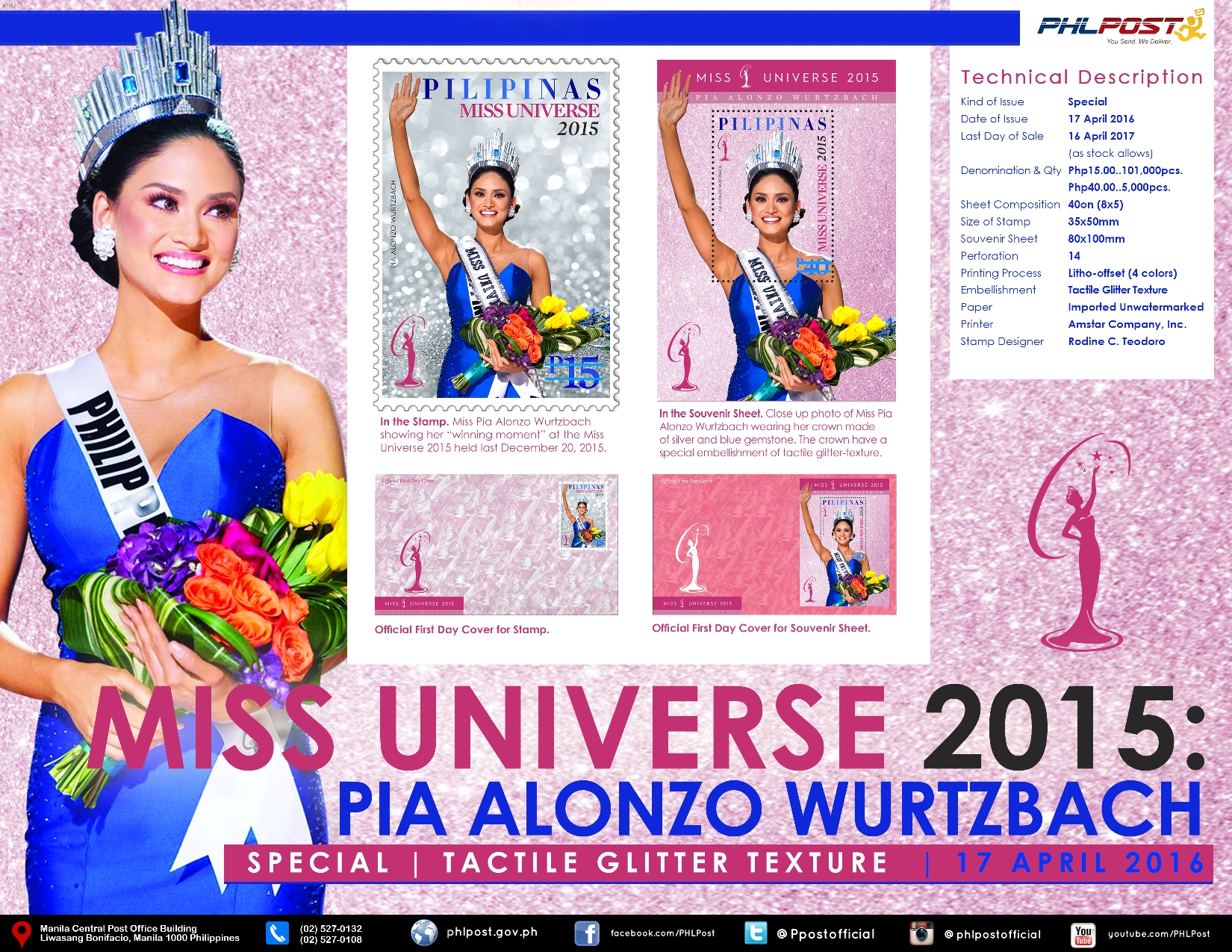 Pia Wurtzbach